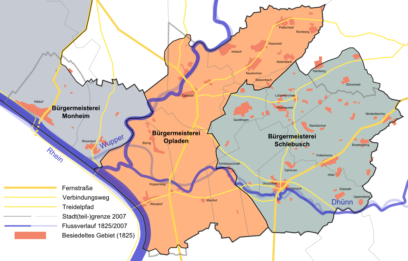 Karte des heutigen Leverkusener Gebiets um 1820. Dargestellt ist die Besiedelung um 1825, die wichtigsten Straßen und Verbindungswege vor der Industrialisierung sowie die Grenzen der Bürgermeistereien bzw. Sammtgemeinden 1820. Die heutigen Stadt- bzw. Stadtteilgrenzen sind grau dargestellt.